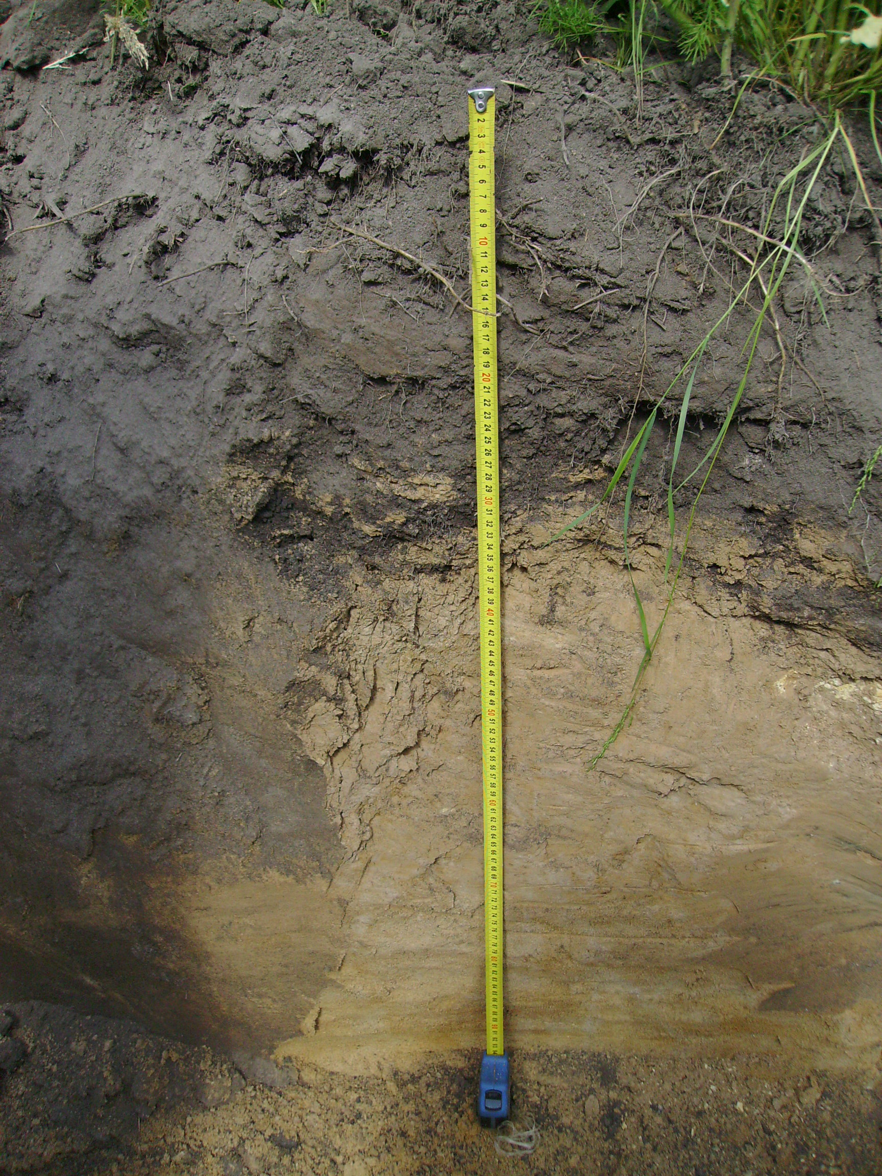 Gleistunud rähkmuld. Mullahorisont profiiliga A-Bmg-Cg. Pilt on tehtud Harjumaal, Kose vallas seoses Eesti mullastiku aine kursusetööga.